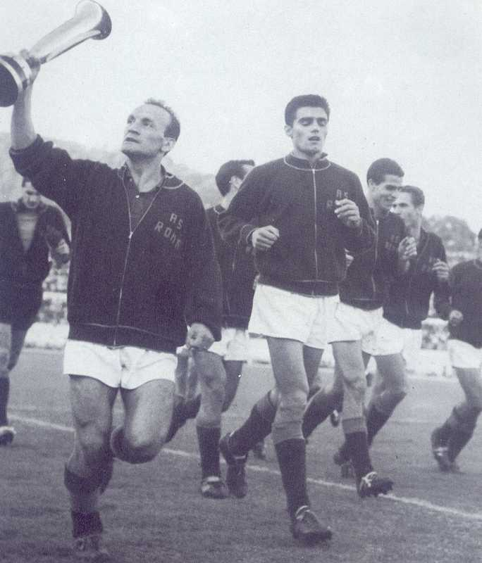 La Roma festeggia la conquista della Coppa delle Fiere nell'edizione 1960-1961, dopo la vittoria nella finale di ritorno (2-2; 2-0) contro il Birmingham City allo stadio "Olimpico" di Roma; il capitano giallorosso Giacomo Losi solleva la coppa, primo trofeo internazionale del club. Licensing 1961 Categoria:Immagini di Giacomo Losi